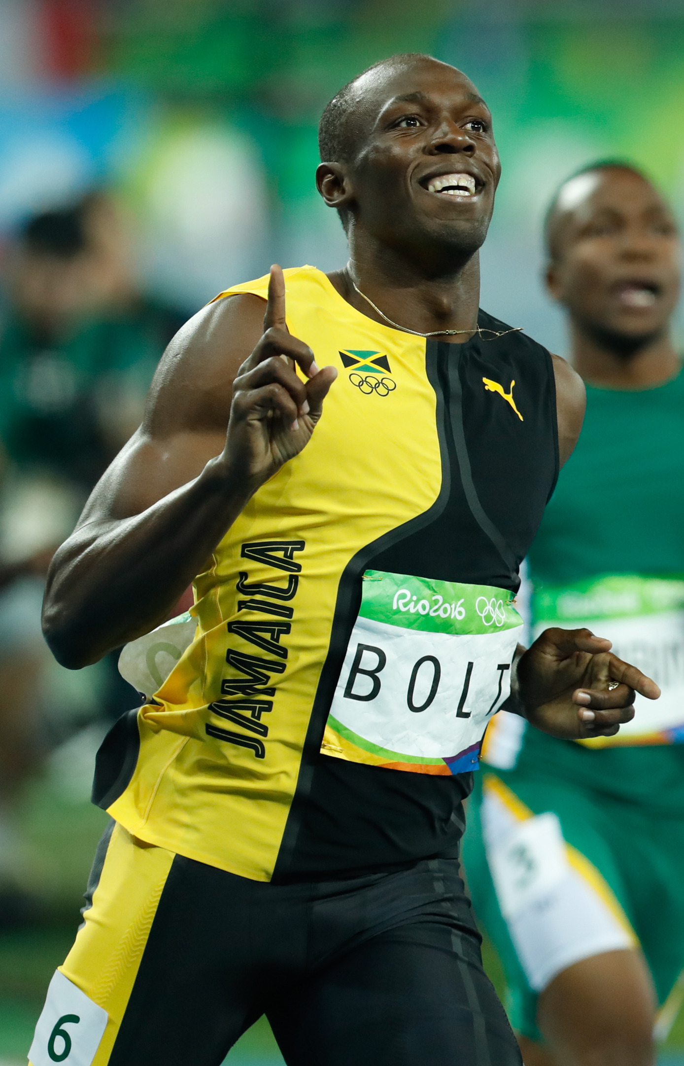 Rio de Janeiro - O jamaicano Usain Bolt, garantiu o ouro e fez história ao conquistar pela terceira vez o título de homem mais rápido do mundo nos 100 metros rasos em uma Olimpíada (Fernando Frazão/Agência Brasil).